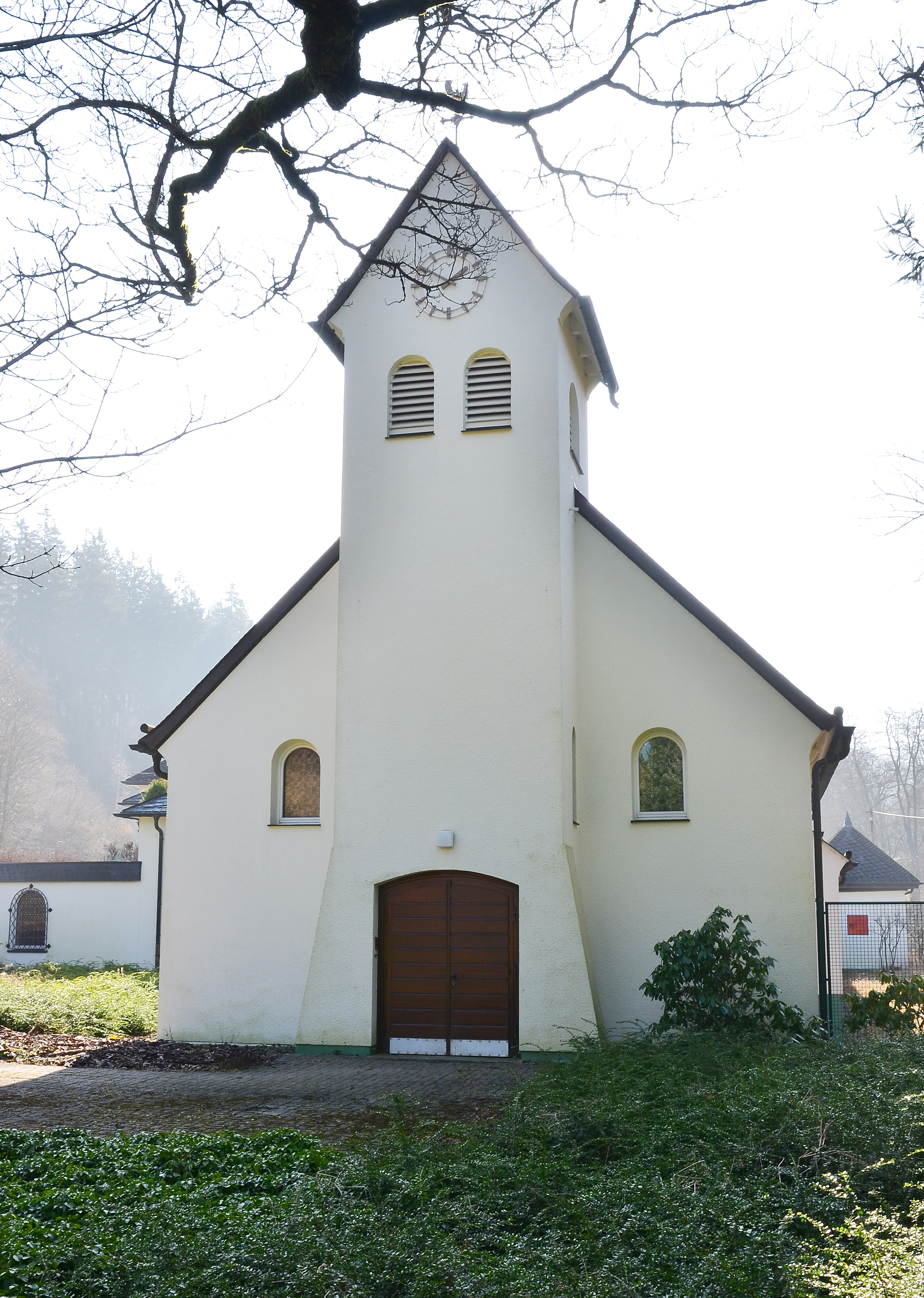 Brilon Wald, die Kirche vom ehemaligen Kloster St. Josef.Das Kloster gehörte bis zum Frühjahr 2013 dem Karmel an.